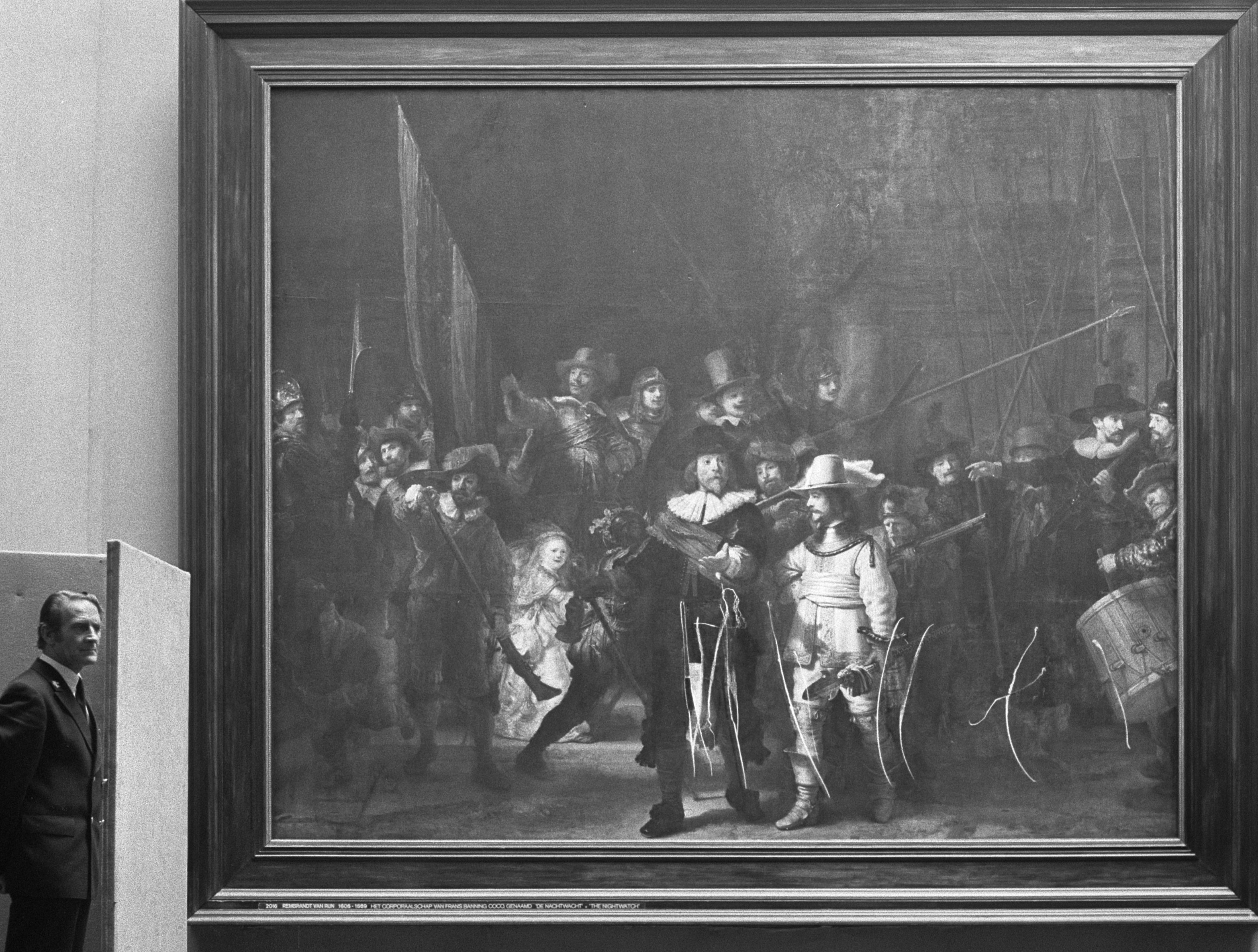 Nachtwacht, het gehele beschadigde schilderij